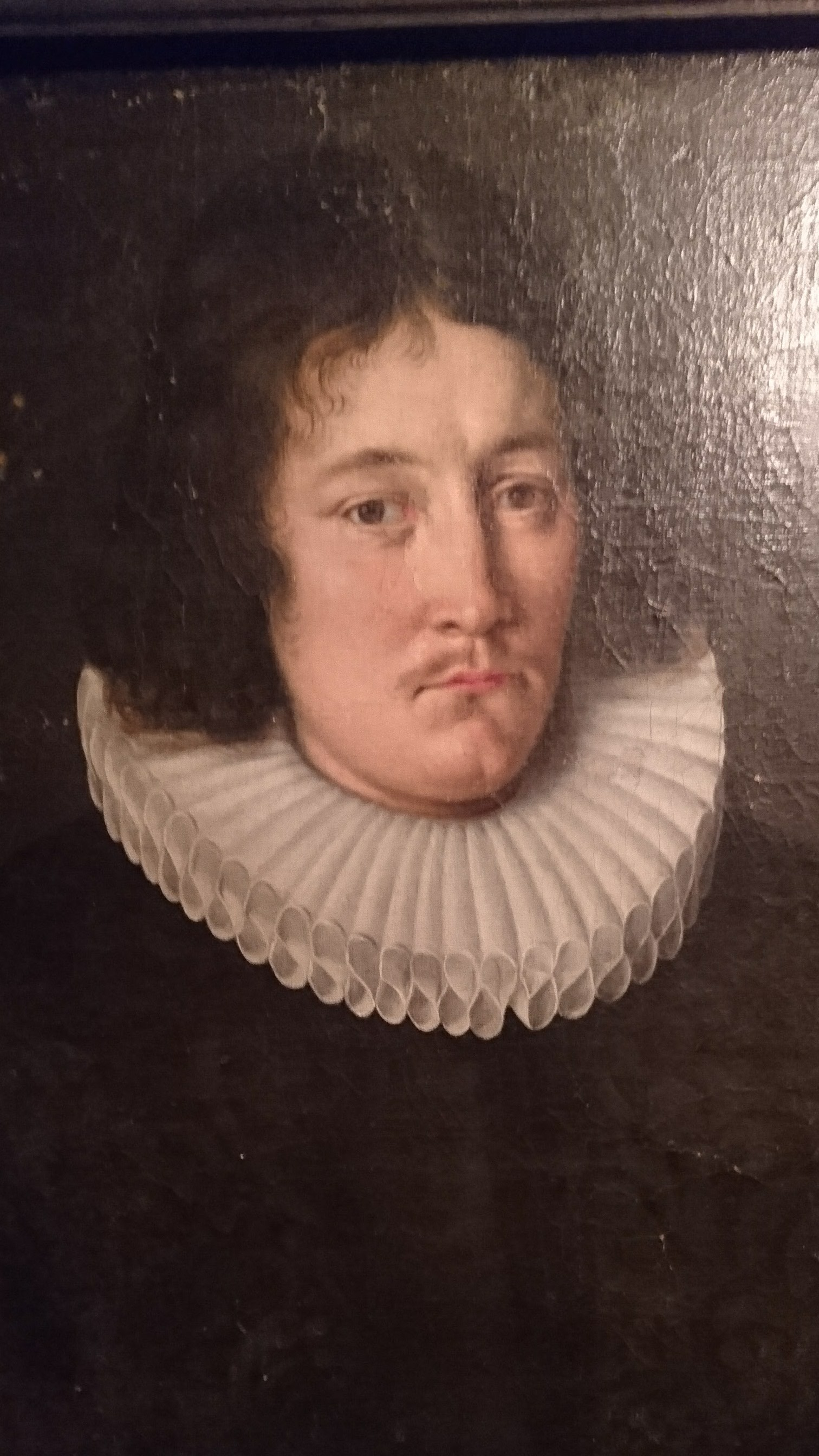 Maleri av Peder Mentzen Darre, et av de få tingene som ble reddet ut av brannen i Gildeskål gamle kirke.